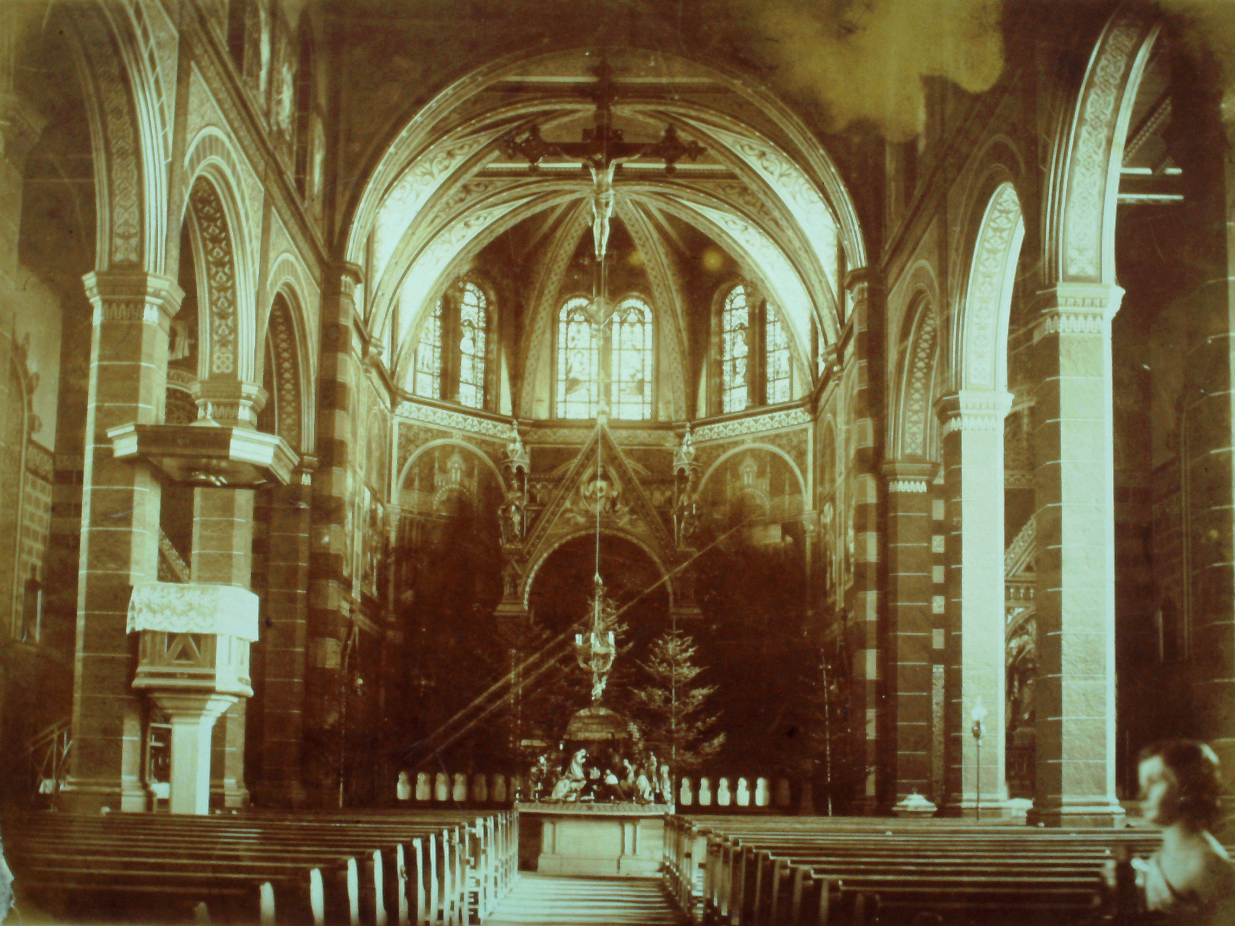 Foto einer Aufnahme des Kircheninneren aus der Zeit vor Einführung der Elektrizität in Bonndorf. Das genauer Datum der Aufnahme ist nicht eindeutig, müsste aber um 1900 sein. Folgende Anhaltspunkte mögen dafür angebracht sein: Ab 1905 gab es in Bonndorf, durch das Städtische Elektrizitätswerk (Gleich-) Strom in Bonndorf. Die Kirche wurde nach 1905 mittels eines Kronleuchters, welcher in der Mitte des Hauptschiffes hing, beleuchtet. Die Kanzel ist die, welche 1850 beim Bau der Kirche eingebaut wurde. Diese wurde später durch eine größere mit vier Holzreliefs (Kirchenlehrer) ersetzt. Die Kreuzwegstationen müssen ebenfalls die von 1850 sein, denn heute sind andere Kreuzwegstationen vorhanden, die auf Simmler zurückgehen sollen. Die Wandflächen bei den Kreuzwegstationen sind heute nicht mehr mit Ornamentmalereien versehen. Die in der Mitte stehende Weihnachtskrippe geht auf Simmler zurück und steht heute in der Hauskapelle des Alten- und Pflegeheims St. Laurentius, der früheren "Spitalkapelle".